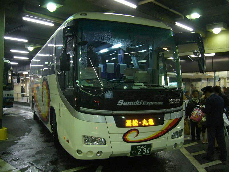 登録番号 香川200か296 四国高速バス所属 高速用車両 （各系統で共通運用） 2007年3月24日 阪急三番街にて撮影 撮影者 Tokatsu kokubu